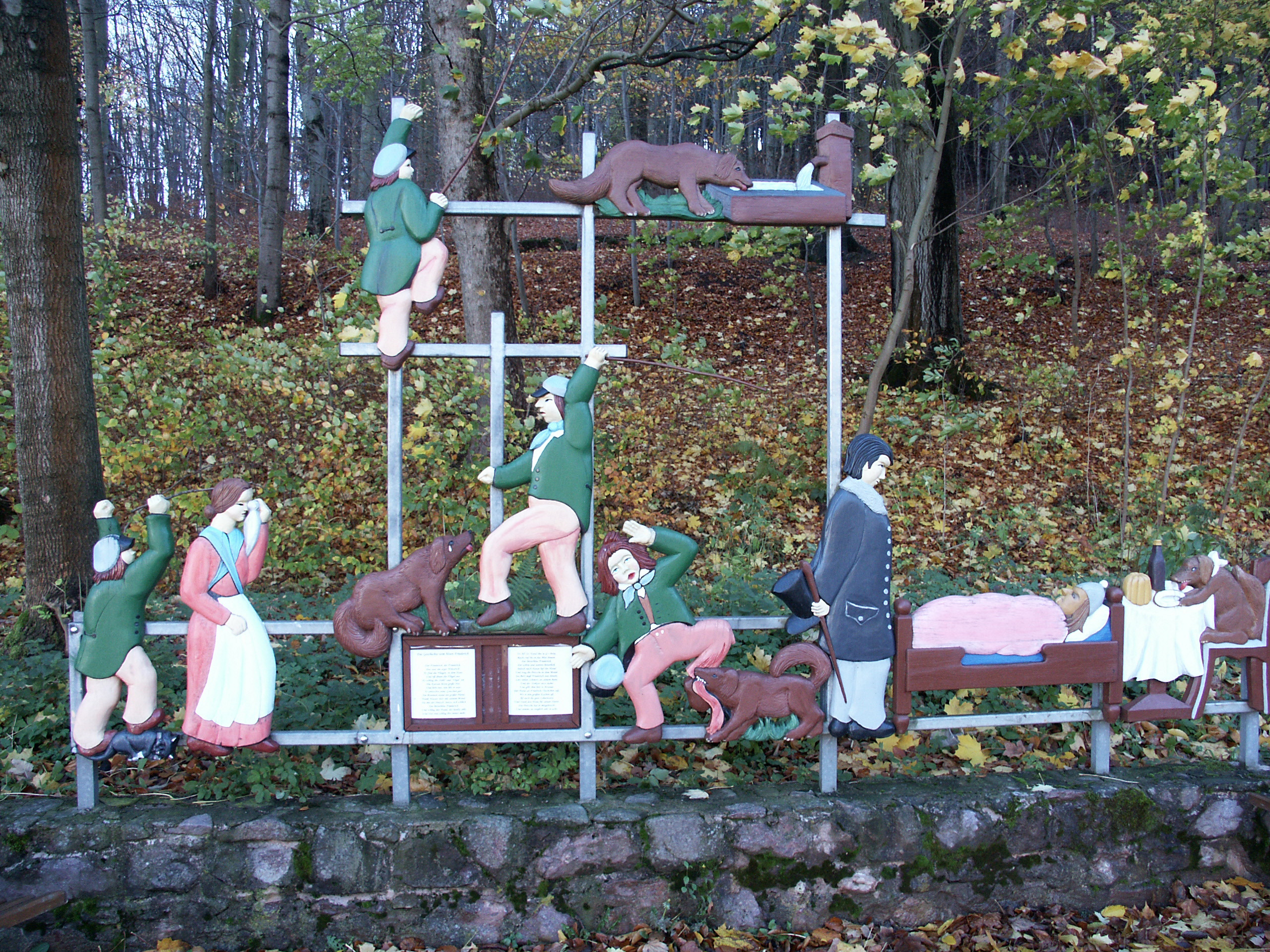 Struwwelpeter-Park Tabarz, geschnitzte Märchenfiguren "Die Geschichte vom bösen Friederich"